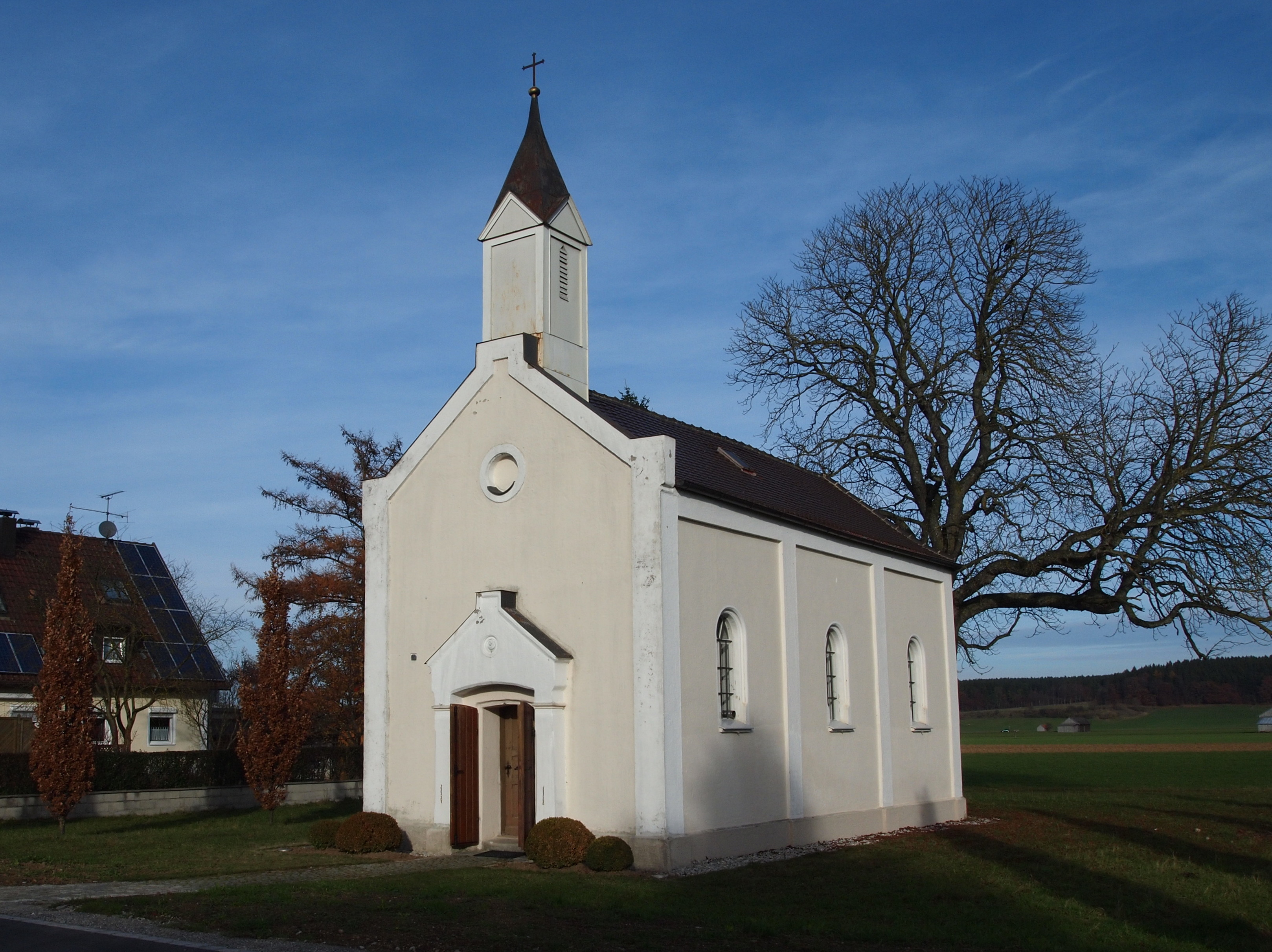 Mindelheim, Im Eichet, Kath. Kapelle Maria Schnee